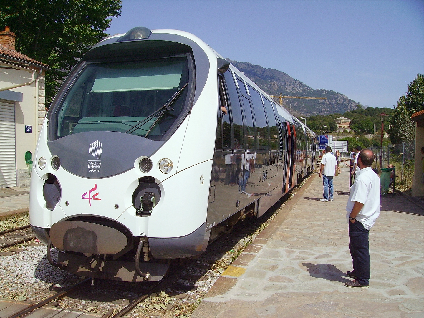 En gare de Corte, le train 23 en provenance de Bastia, attend le départ pour Ajaccio le 22/07/09.